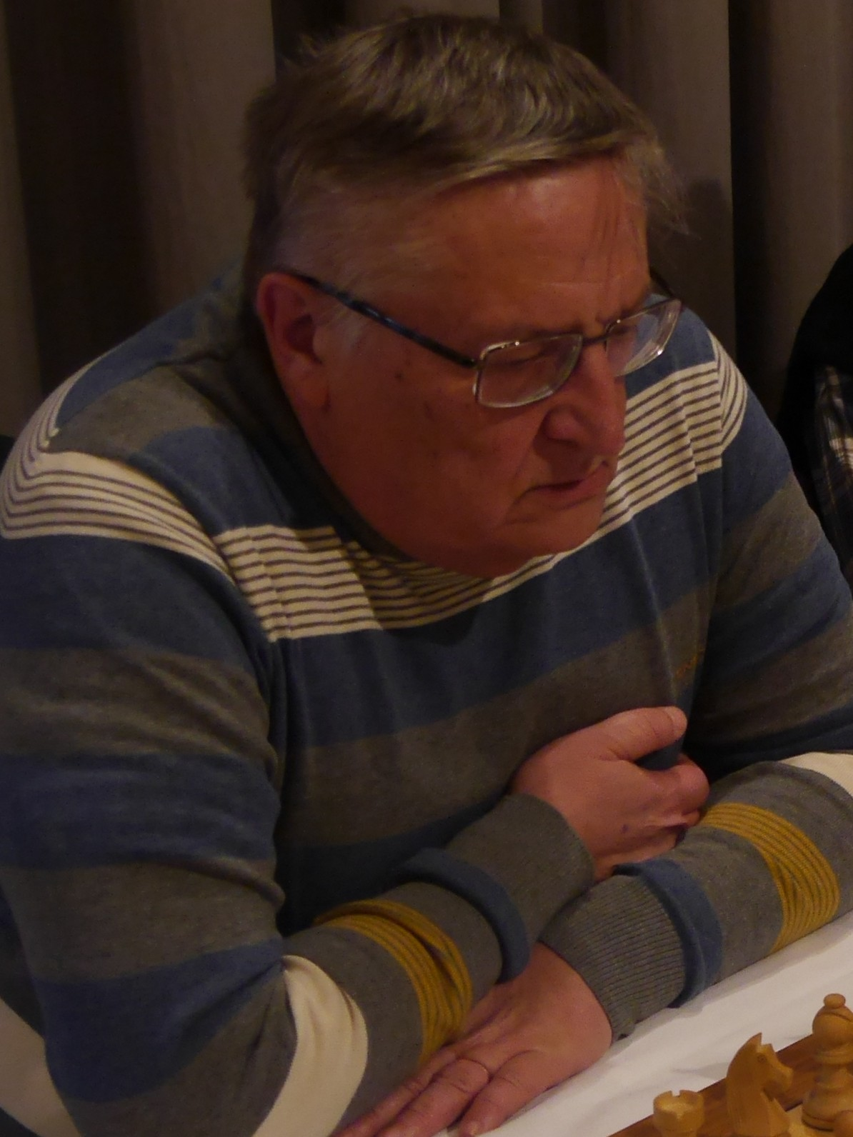 Vladimir Okhotnik, Schachweltmeisterschaft der Senioren 2016 in Marienbad.